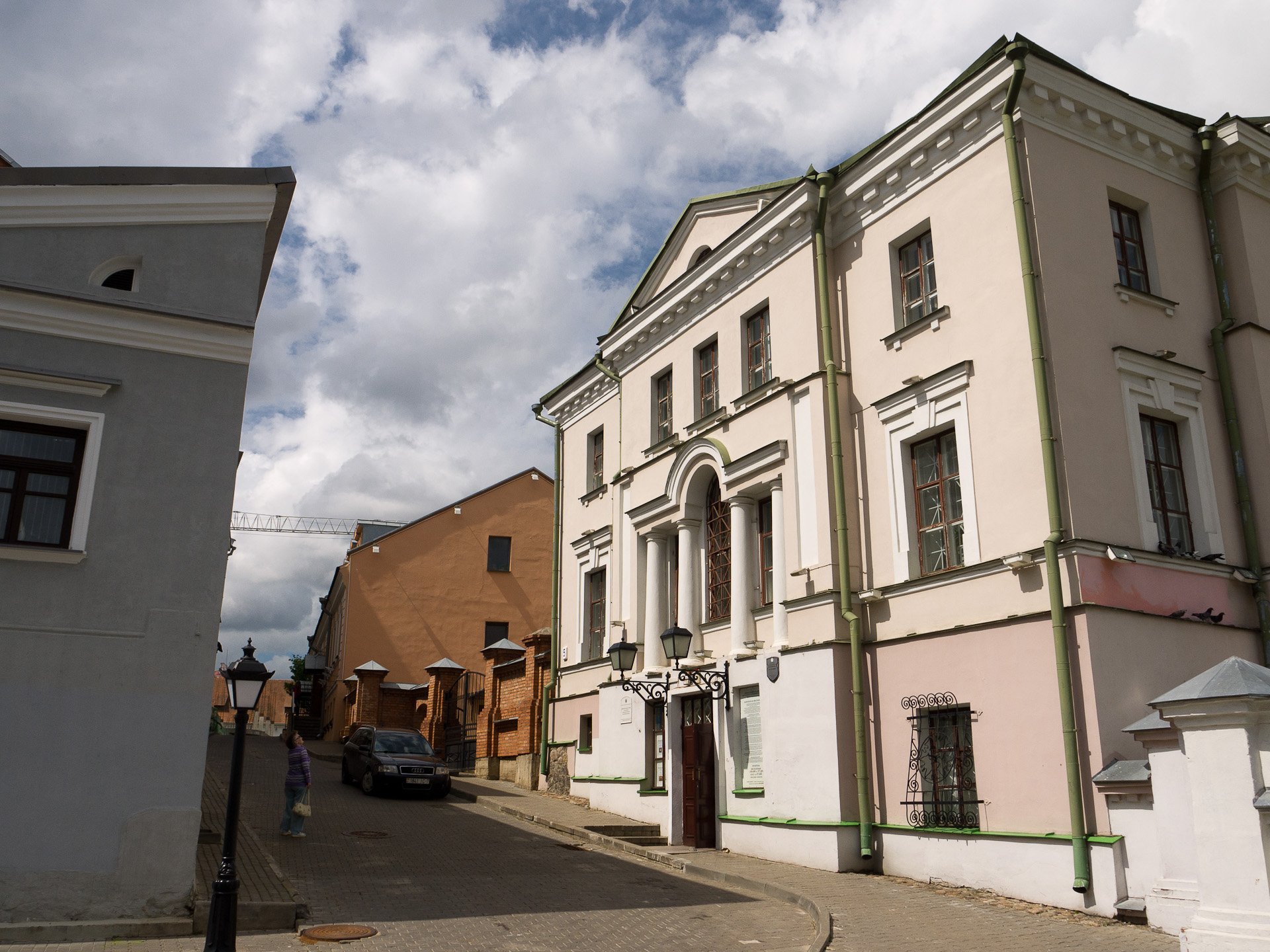 Дом Масонаў